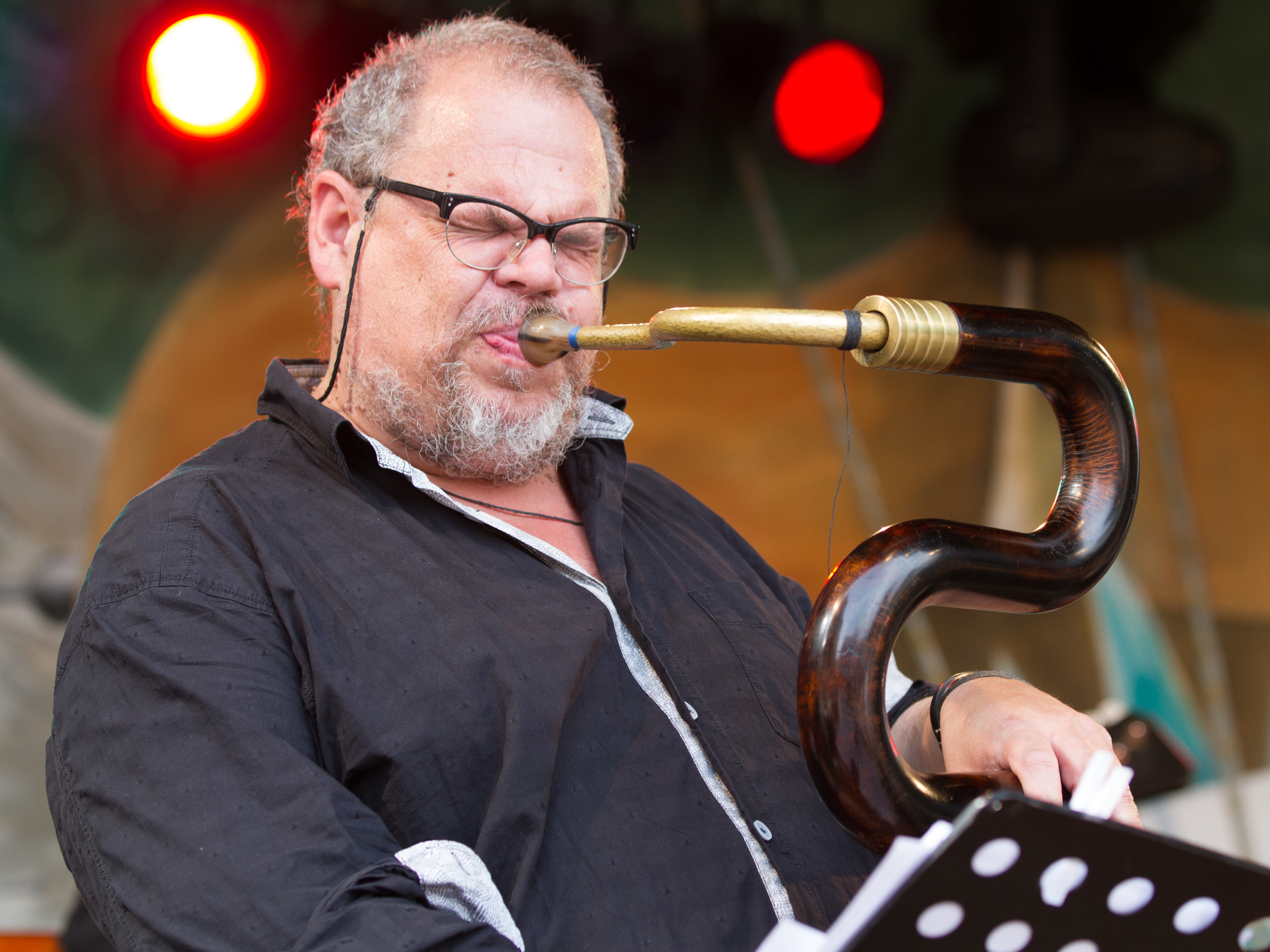 Der Tubist Michel Godard am Serpent beim TFF Rudolstadt 2014